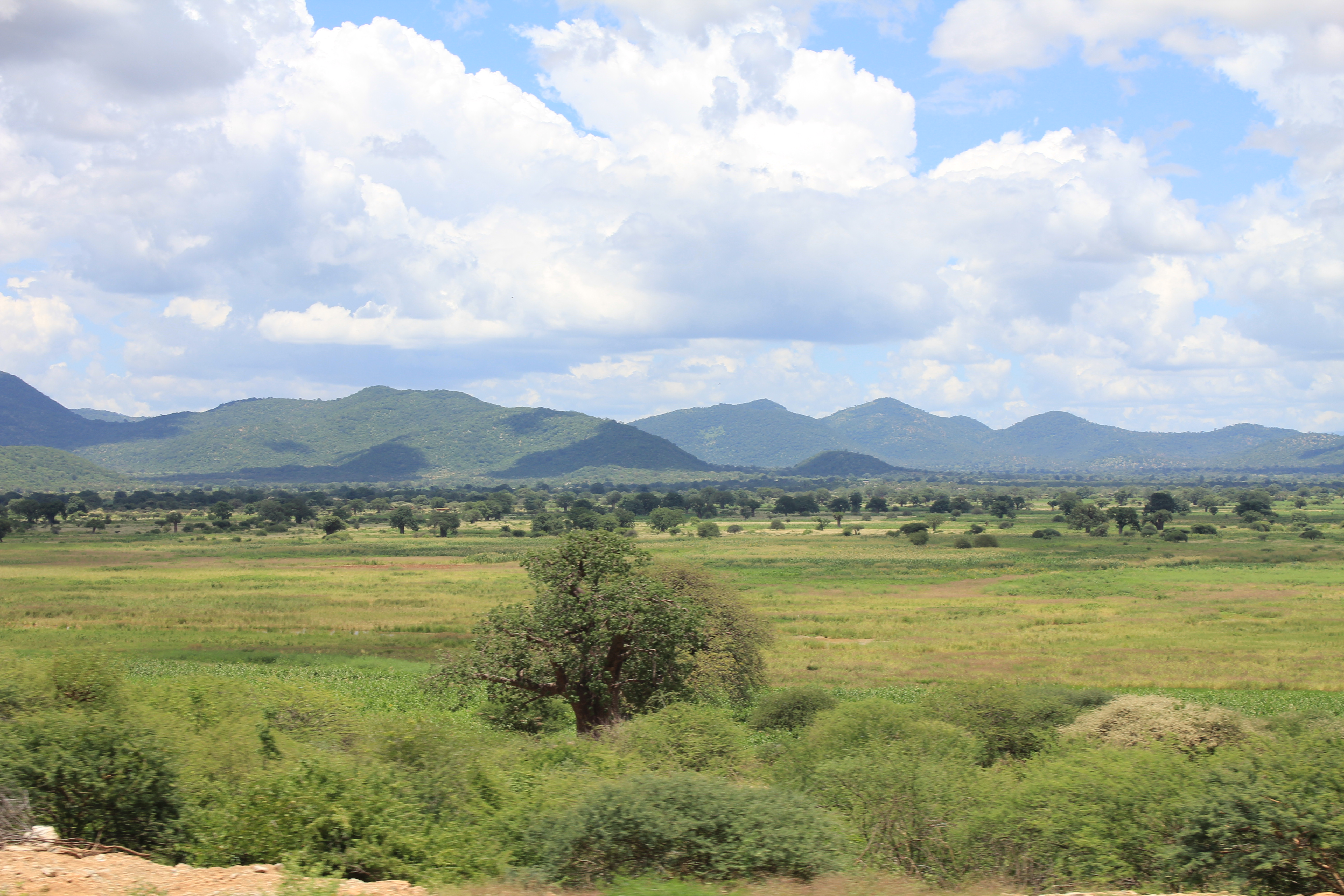 Mpwapwa, Tanzania